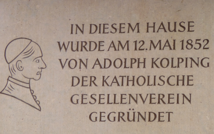 Adolf Kolping Gedenktafel in Salzburg